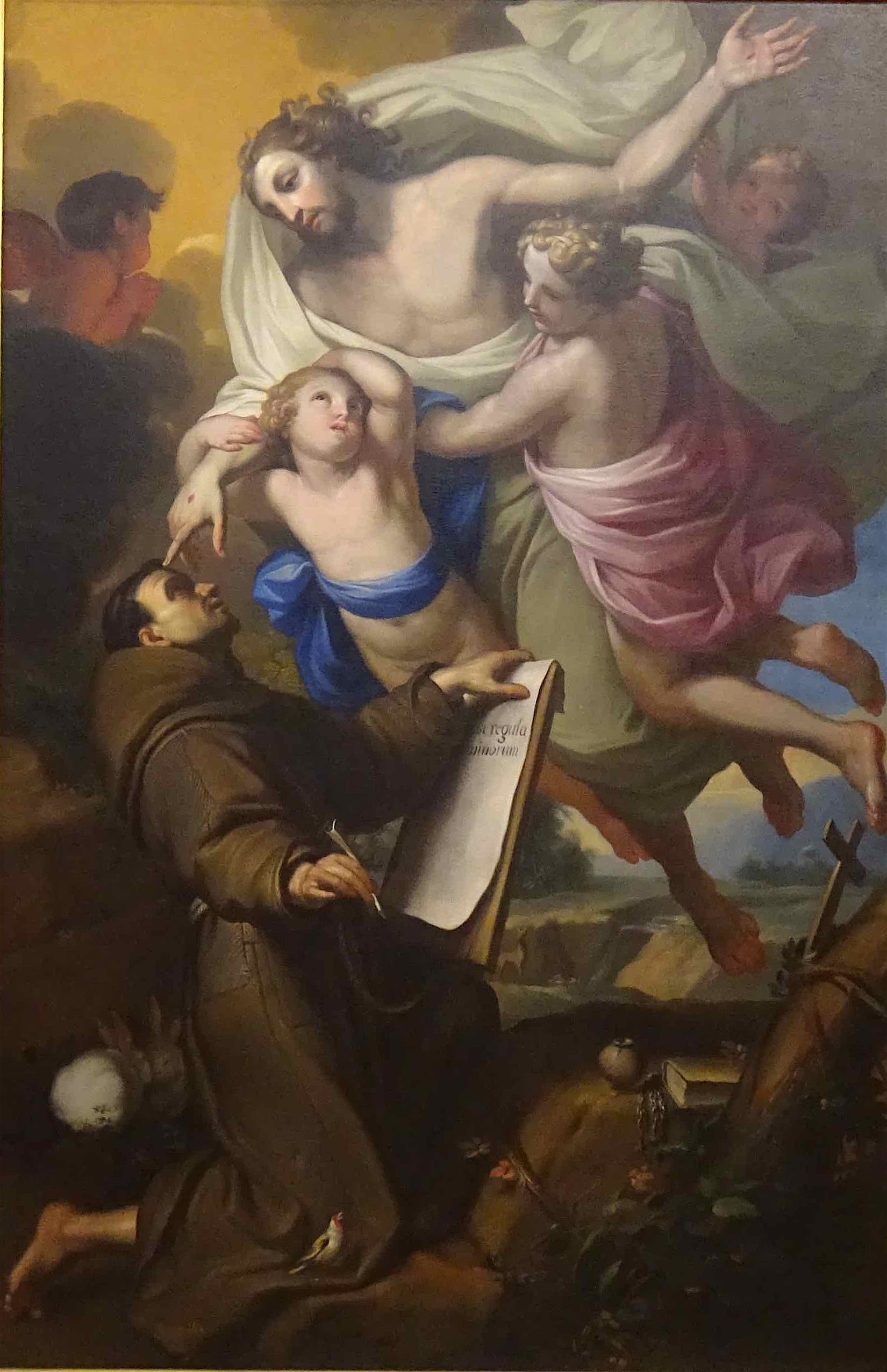 Le Christ dicte la règle à saint François, huile sur toile - 220 x 151 cm